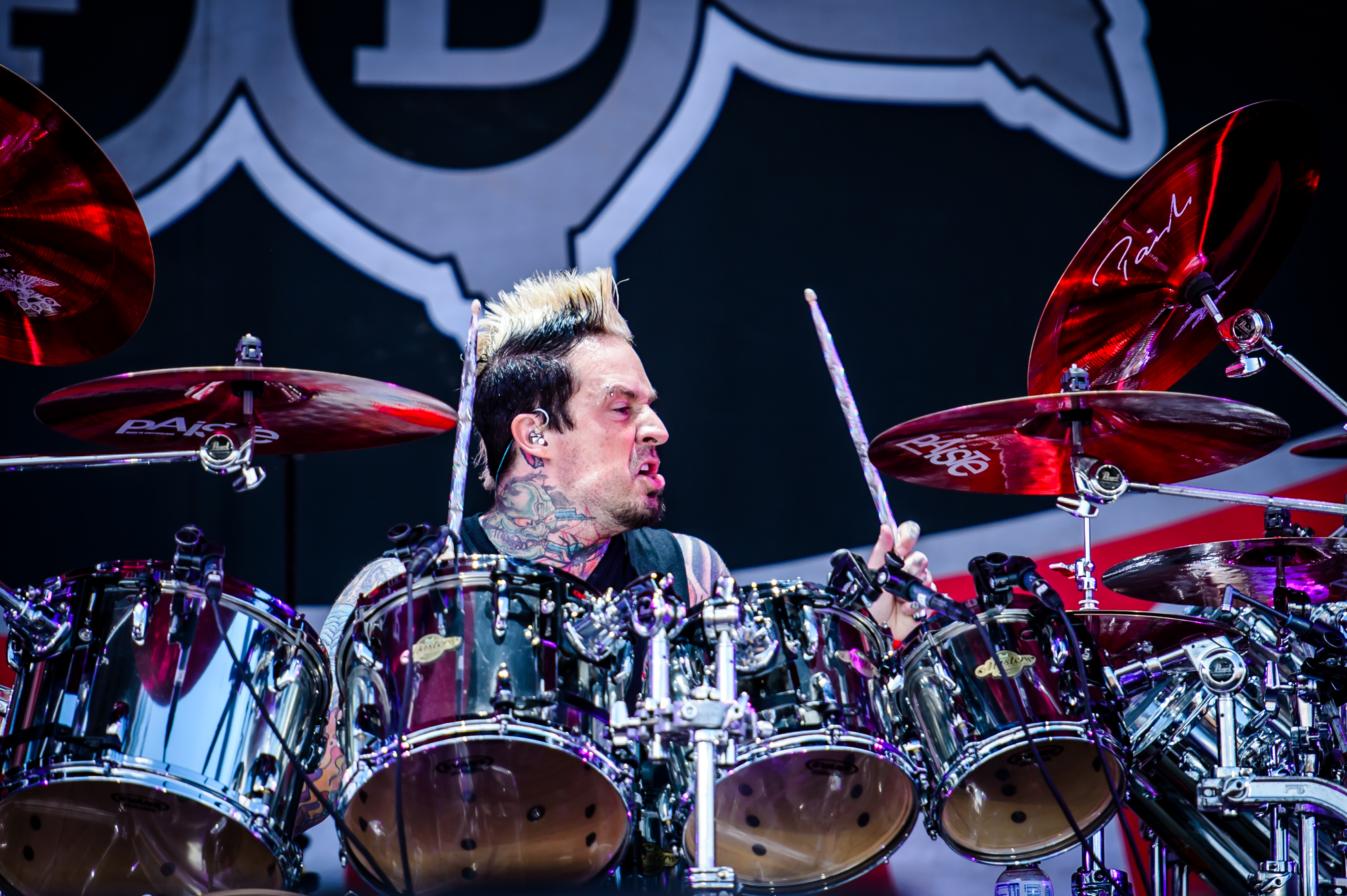 'Rock im Park 2017; Nürnberg': 'Five Finger Death Punch'